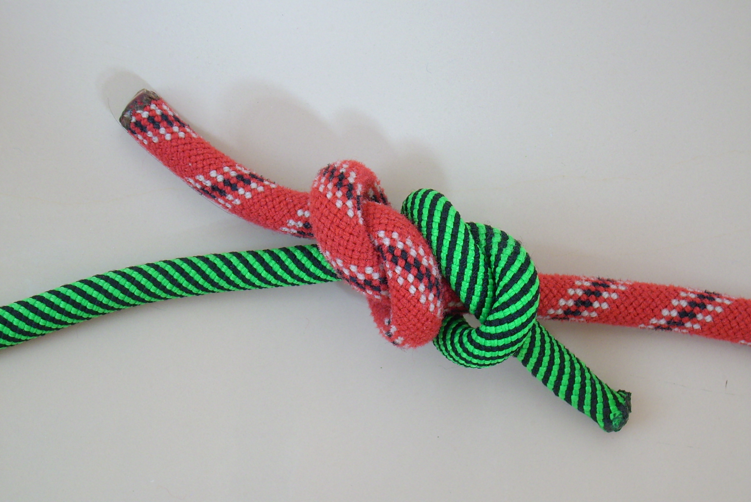 Spierenstich, Knüpfanleitung 3/3